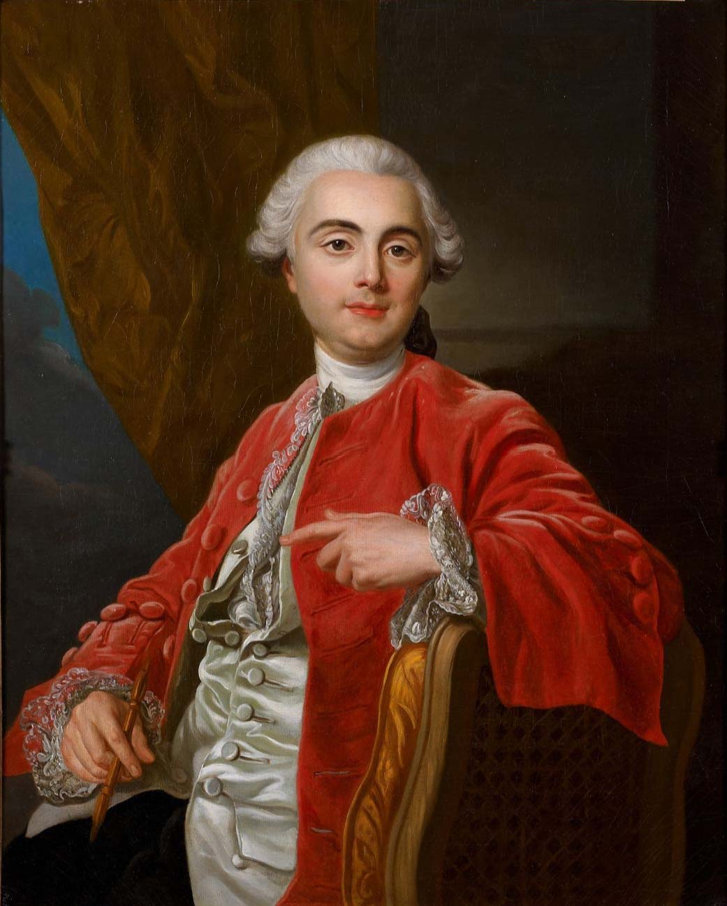 Portrait de Laurent Grimod de La Reynière (1734-1793)